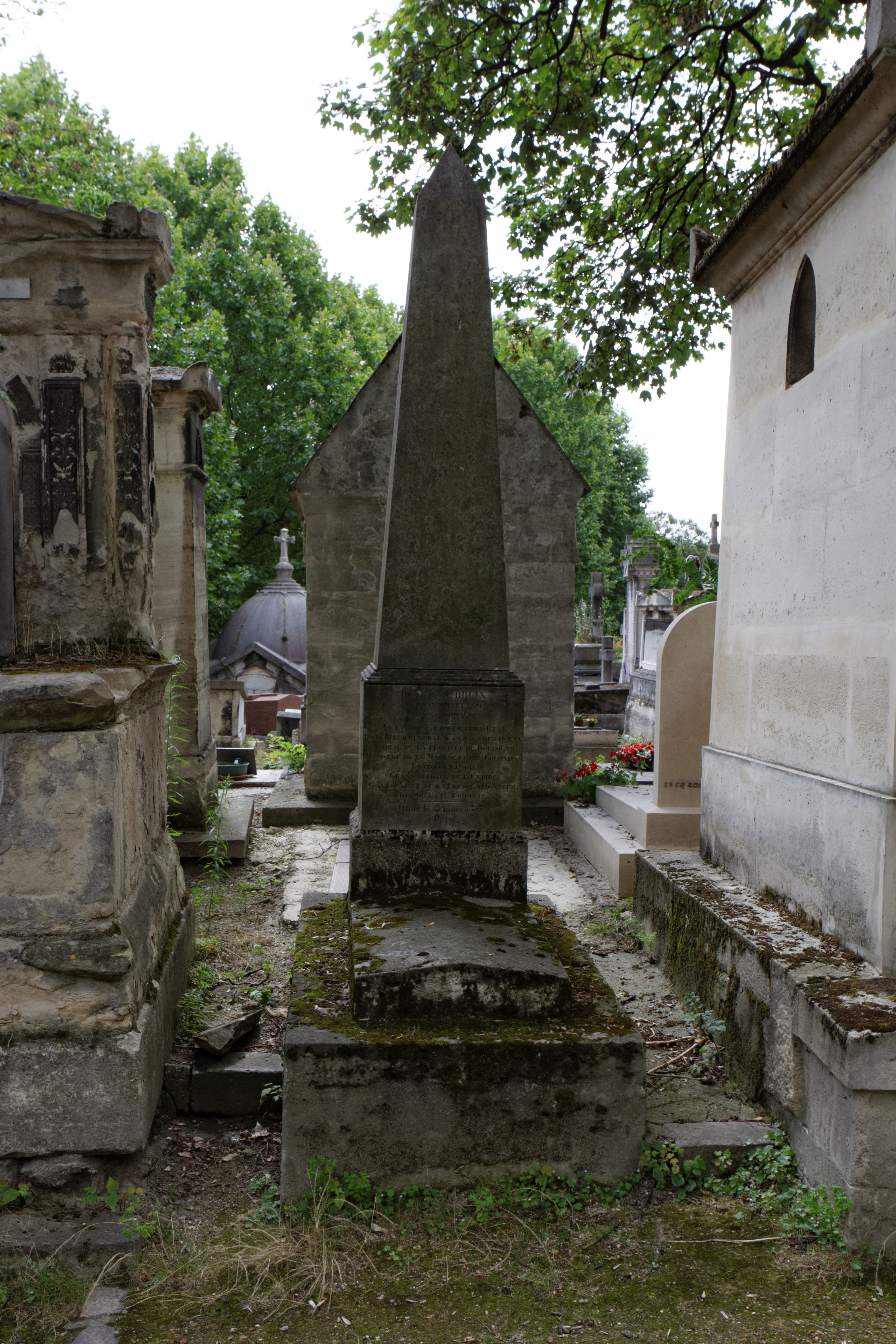 Obélisque.